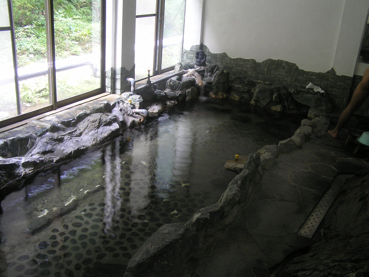 高野温泉（こうやおんせん）和歌山県伊都郡高野町 浴室 ～photo by Autumn Snake 【おぉたむすねィく探検隊】